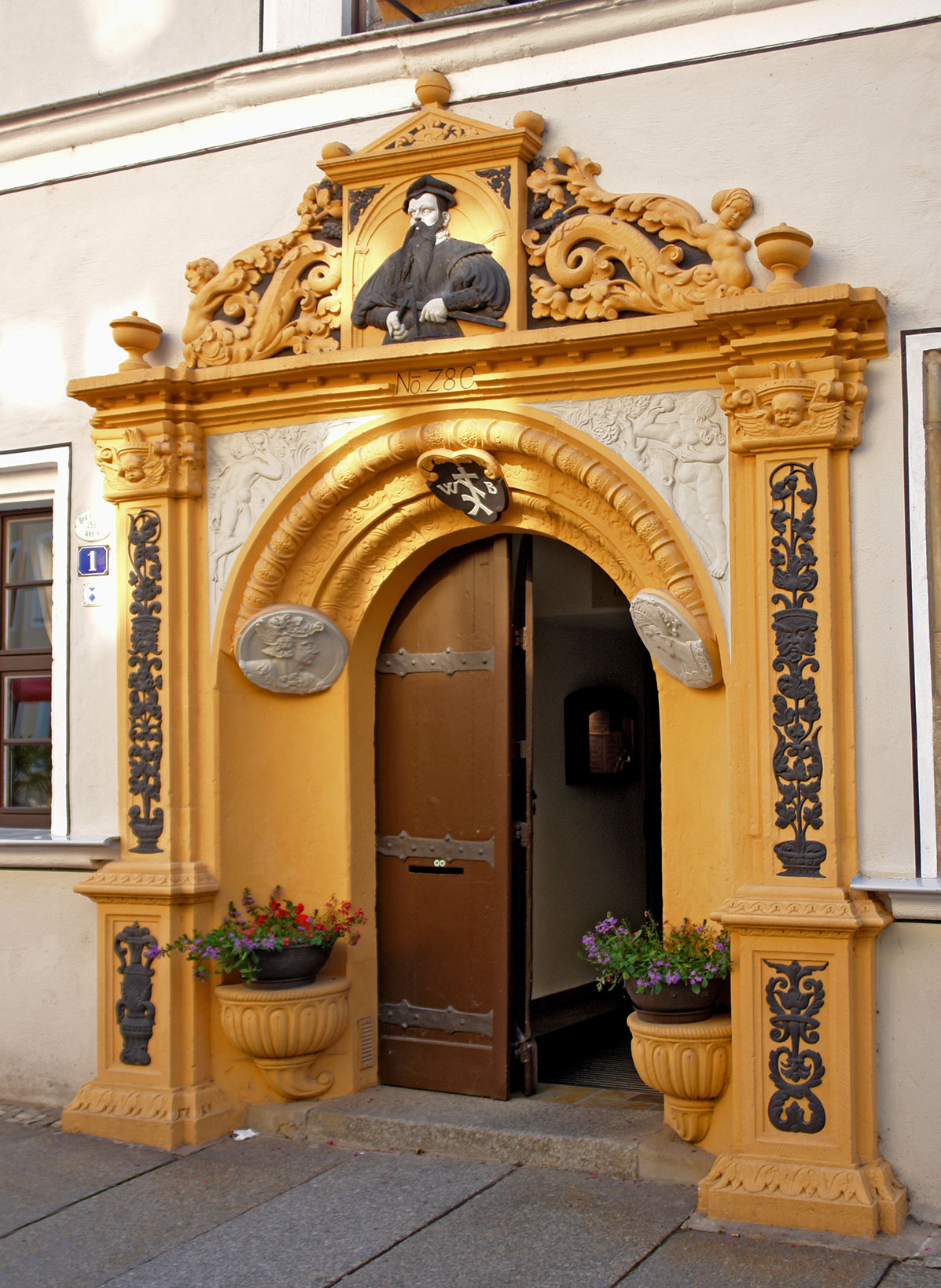 Sitznischenportal aus der Renaissance des Bürgerhauses am Kirchplatz Um 1544 von Baumeister und Steinmetz Wolf Blechschmmidt (Brustbild) errichtetes Haus.